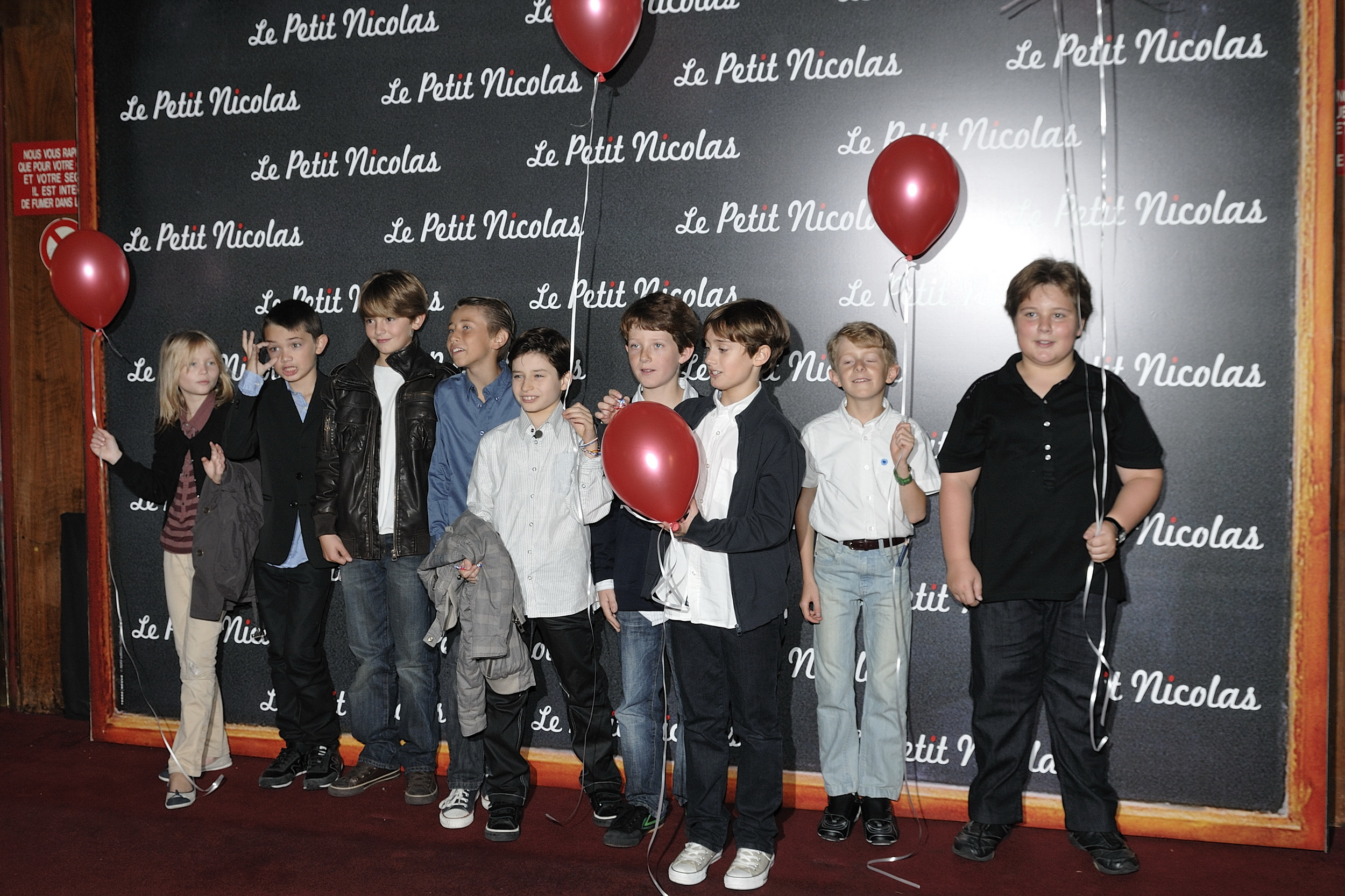 Avant-première du film Le Petit Nicolas au Grand Rex, à Paris, le 20 Septembre 2009, en présence de toute l'équipe de film. Ici : Maxime Godart (au milieu en chemise blanche) et les autres enfants-acteurs du film.